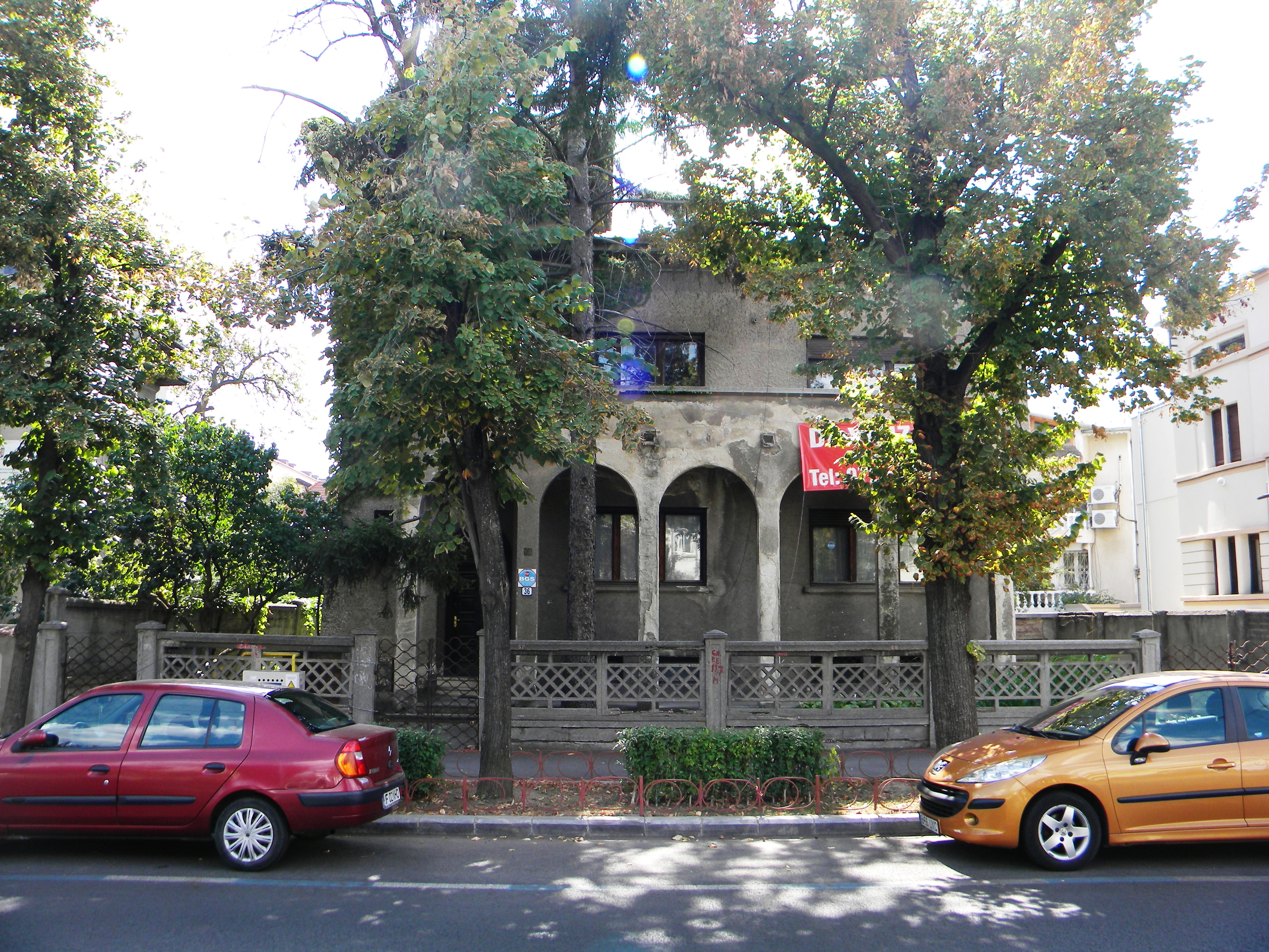 Bucuresti, Romania, Str. Alexandru Constantinescu nr. 36; B-II-m-B-18475